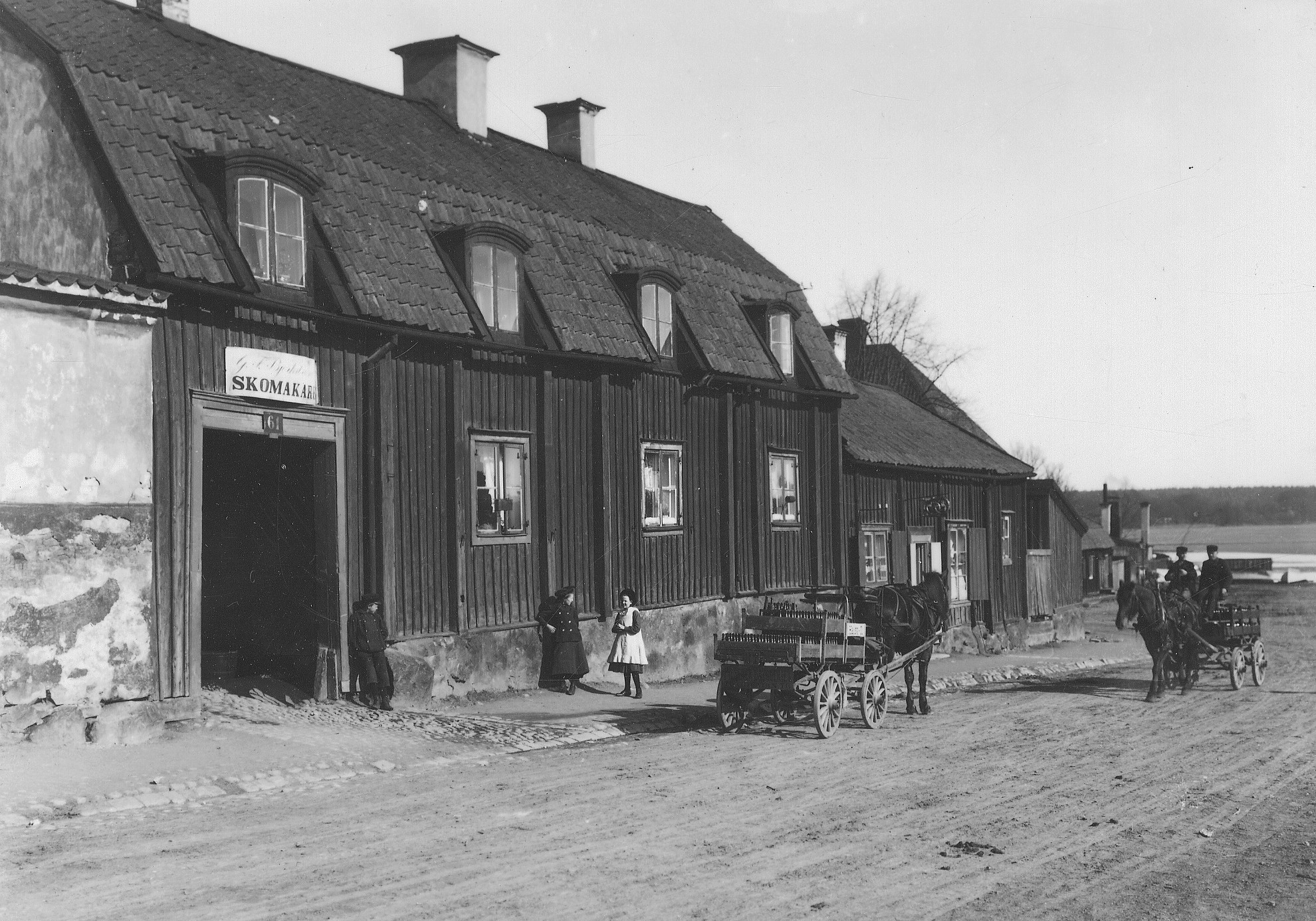 Malmgårdsvägen (nuvarande nr 61), söderut